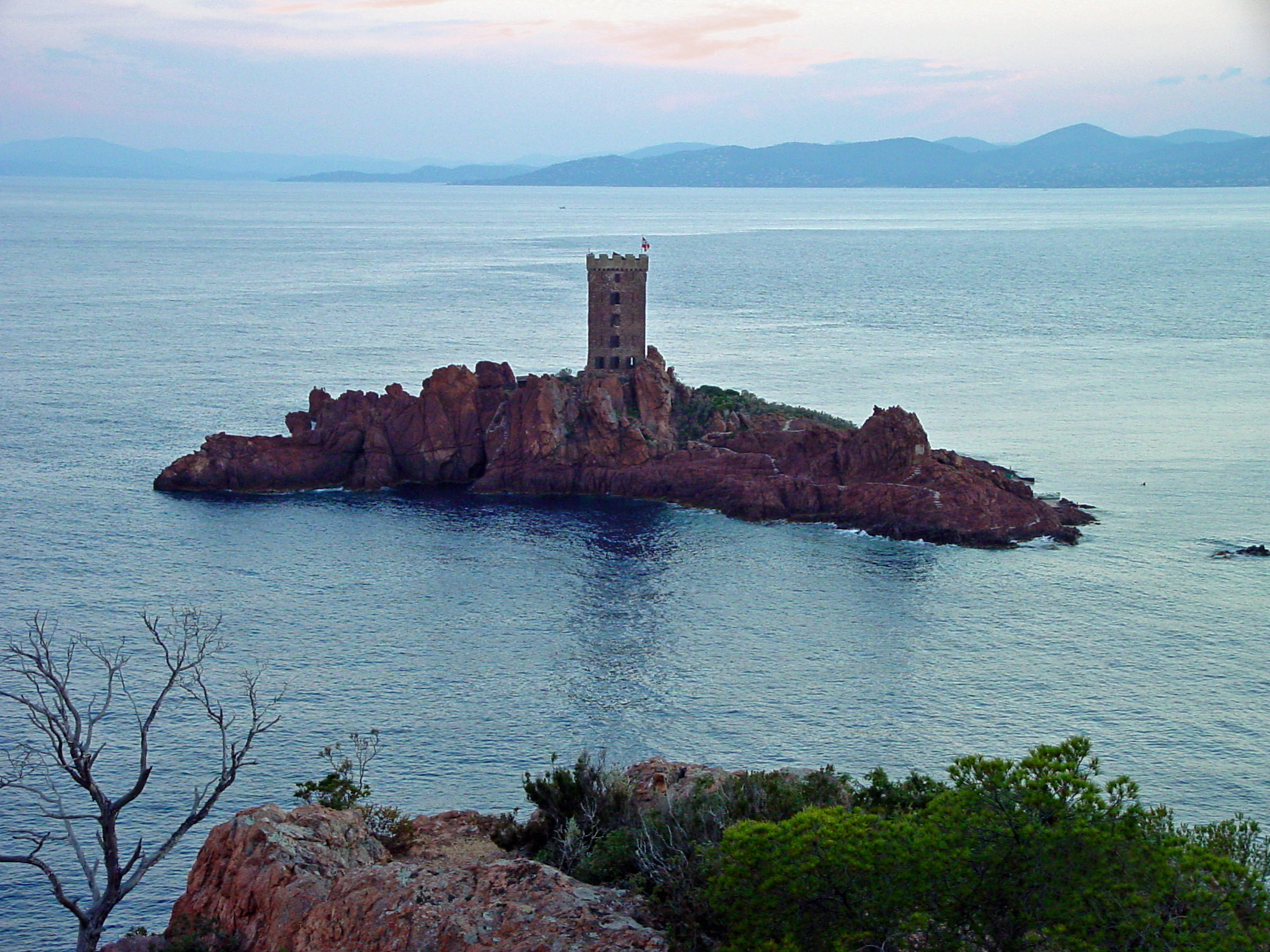 Île d´Or bei Dramont